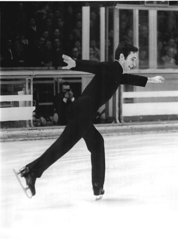 Patrick Pera Zentralbild Gahlbeck 10.4.1968 Berlin: Vorschaubild zur Schaulaufveranstaltung am 15.4.1968. An den Schaulaufveranstaltungen zum Abschluß der Eiskunstlauf-Saison in Karl-Marx-Stadt und am 15.4.1968 in der Eishalle des Berliner Sportforums wird der Bronzemedaillengewinner von Grenoble und WM-Dritte von Genf, Patrick Pera (Frankreich), teilnehmen.